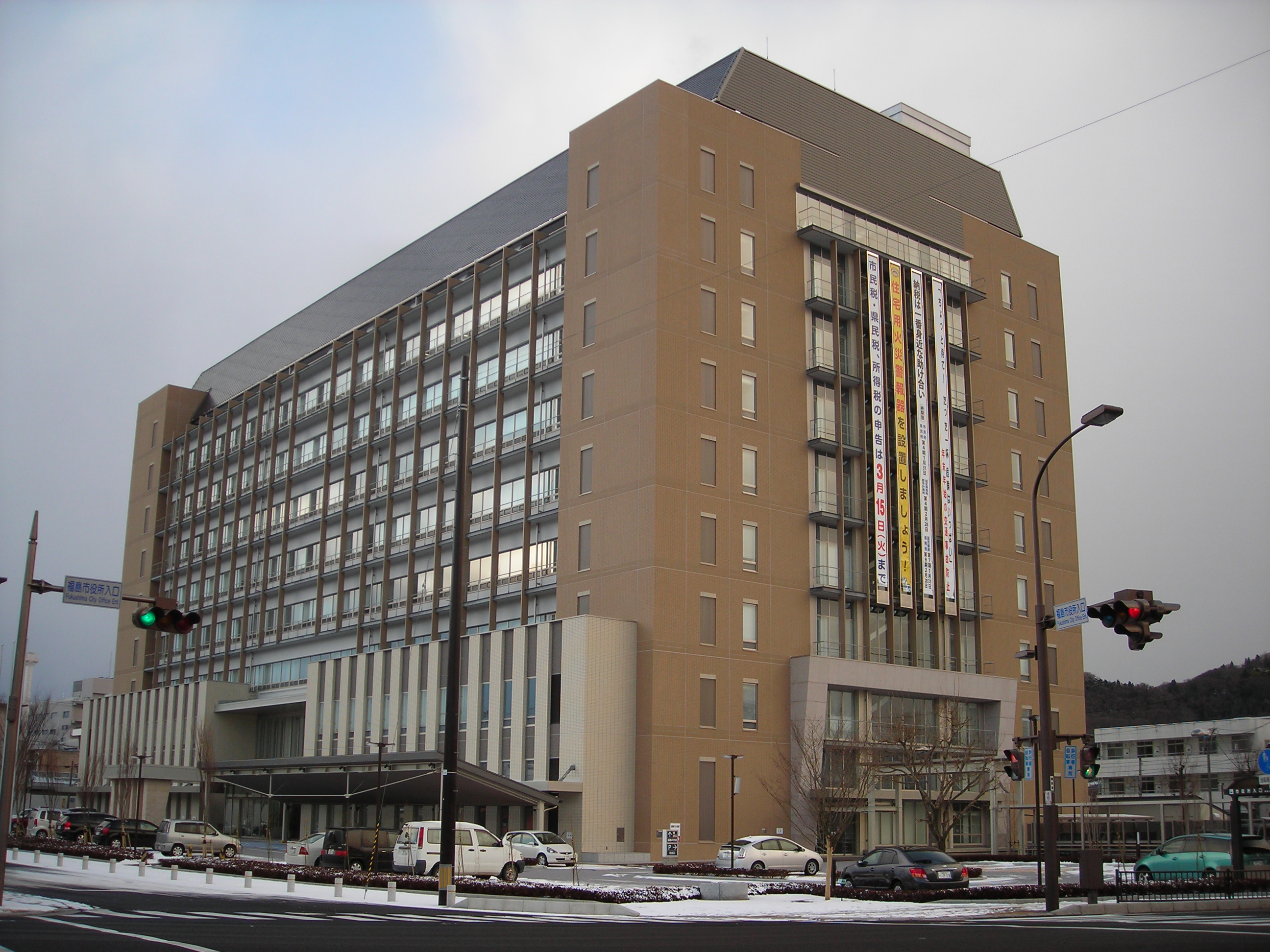 福島市役所 東棟 2011年1月16日撮影